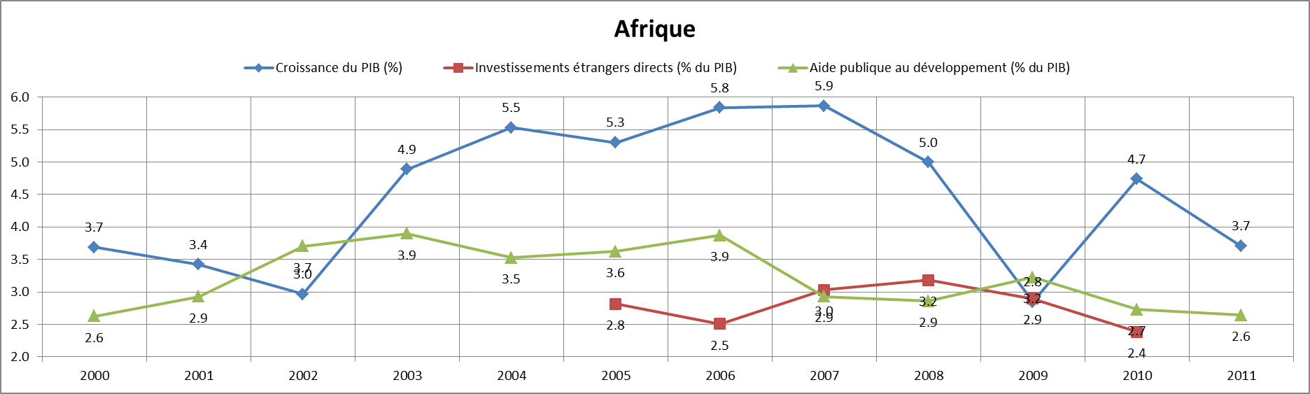 Afrique, 2000-2011, courbes de croissance du PIB, investissements étrangers directs et aide publique au développement